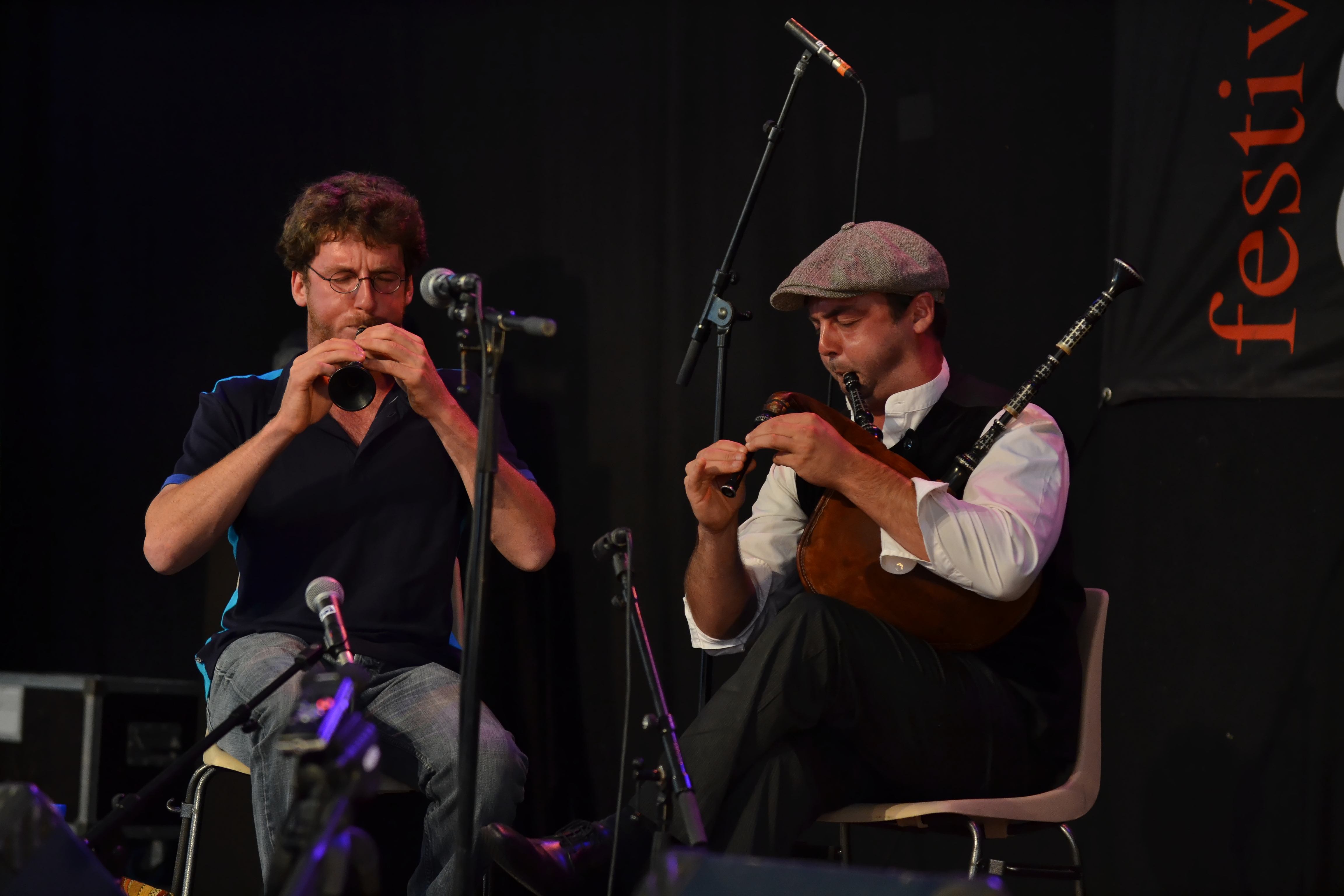 Couple Koz Guillou / Goubin participant au Trophée de la Plume de Paon le samedi 27 juillet 2013 à l'espace Saint-Corentin lors du festival de Cornouaille.